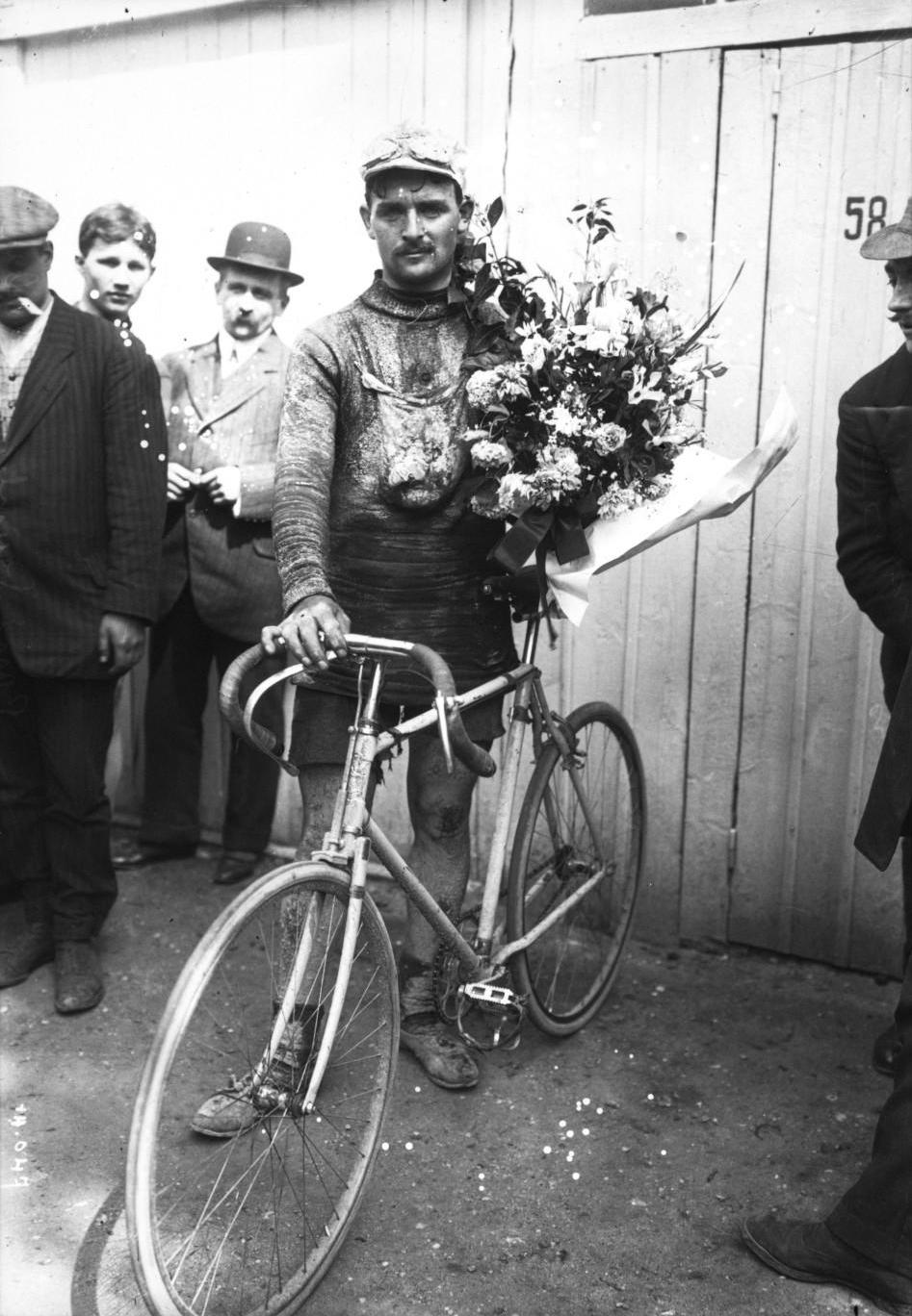 François Faber à l'arrivée de Bordeaux-Paris 1911. Bibliothèque nationale de France